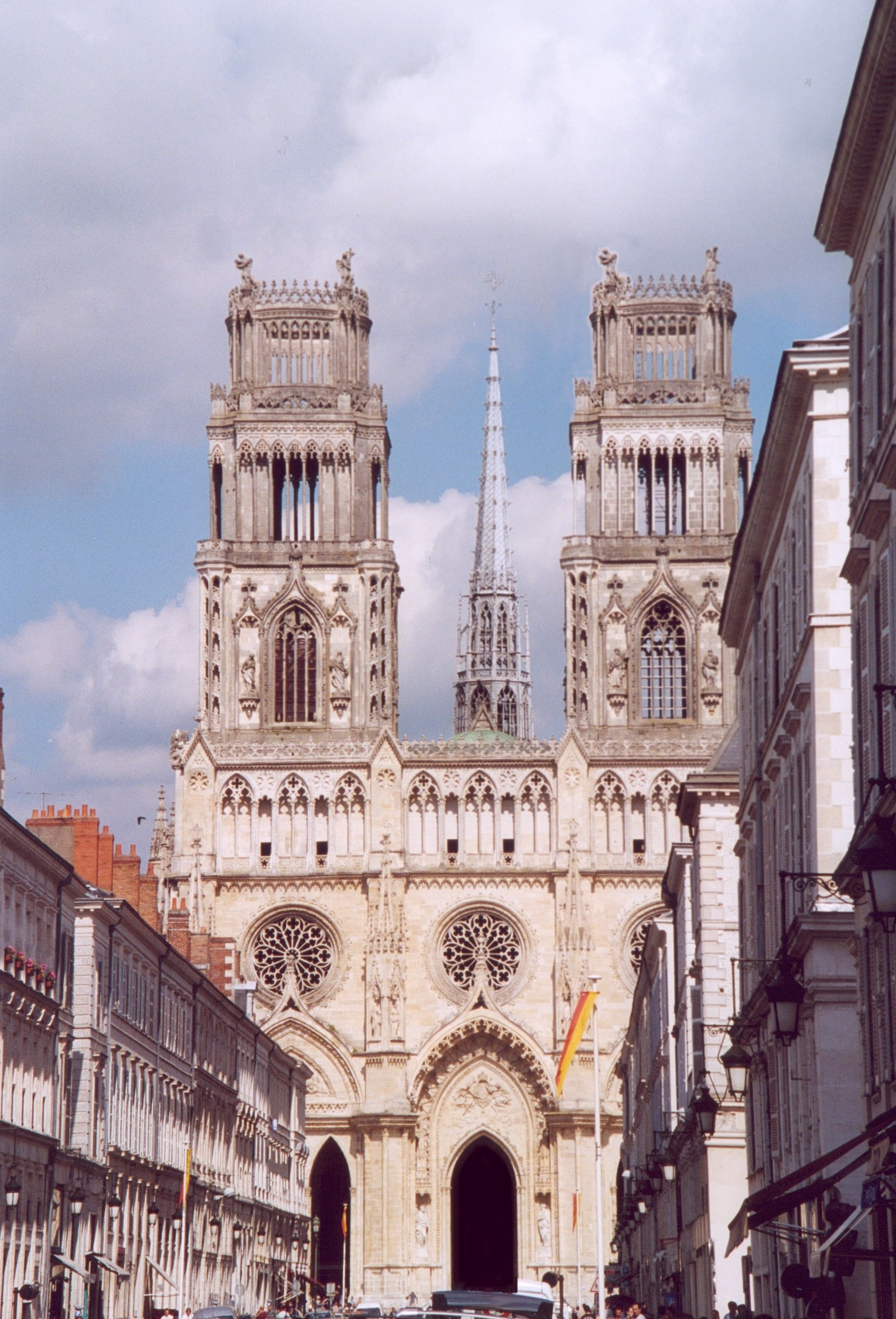 France Loiret Orléans Cathédrale Sainte-Croix Photographie prise par GIRAUD Patrick